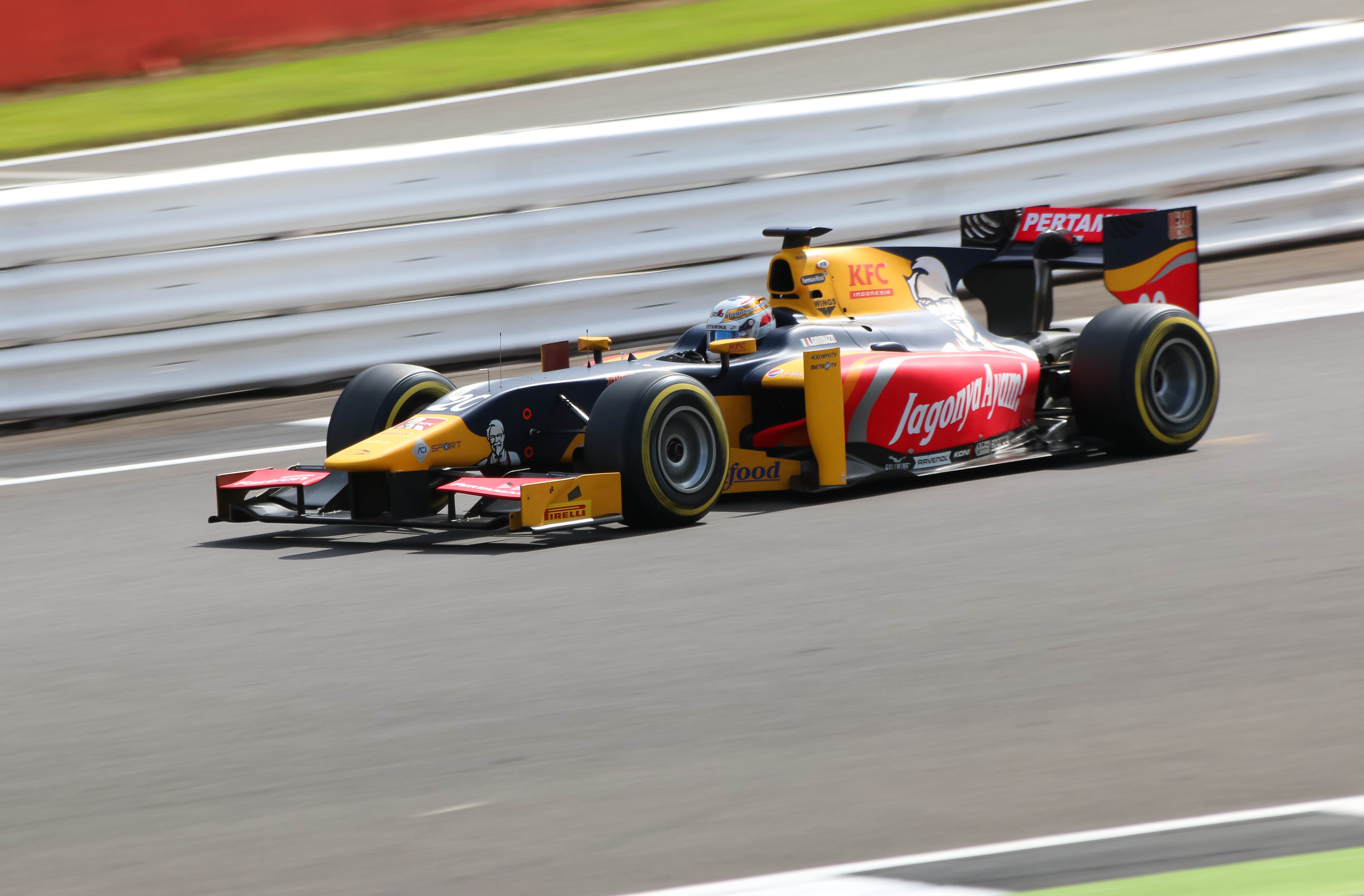 2016 GP2 Series, Silverstone Circuit.